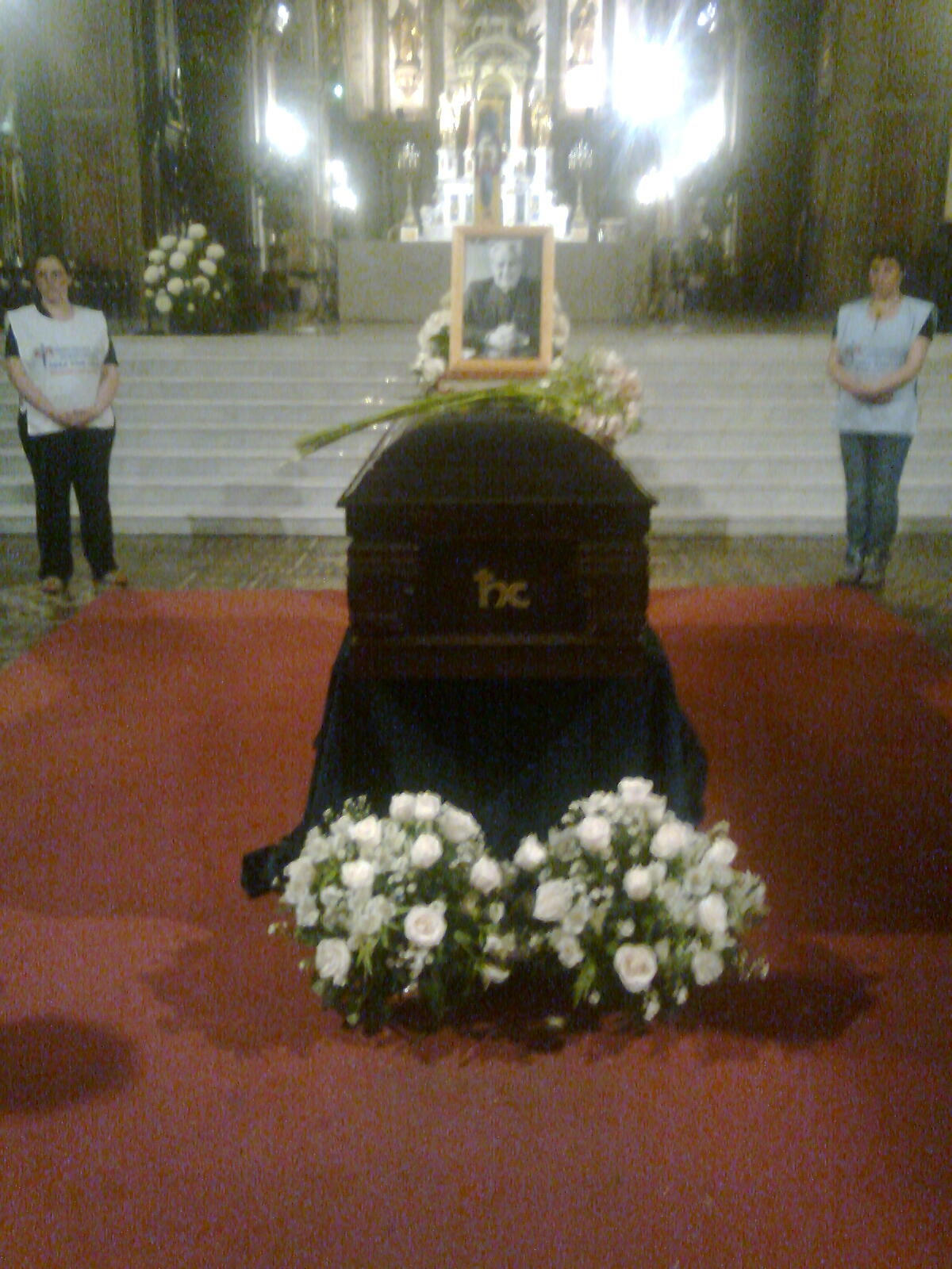 Velorio de Monseñor Sergio Valech Aldunate (Santiago, 21 de octubre de 1927 – Santiago, 24 de noviembre de 2010[1] ) fue un obispo emérito de la Arquidiócesis de Santiago de Chile.